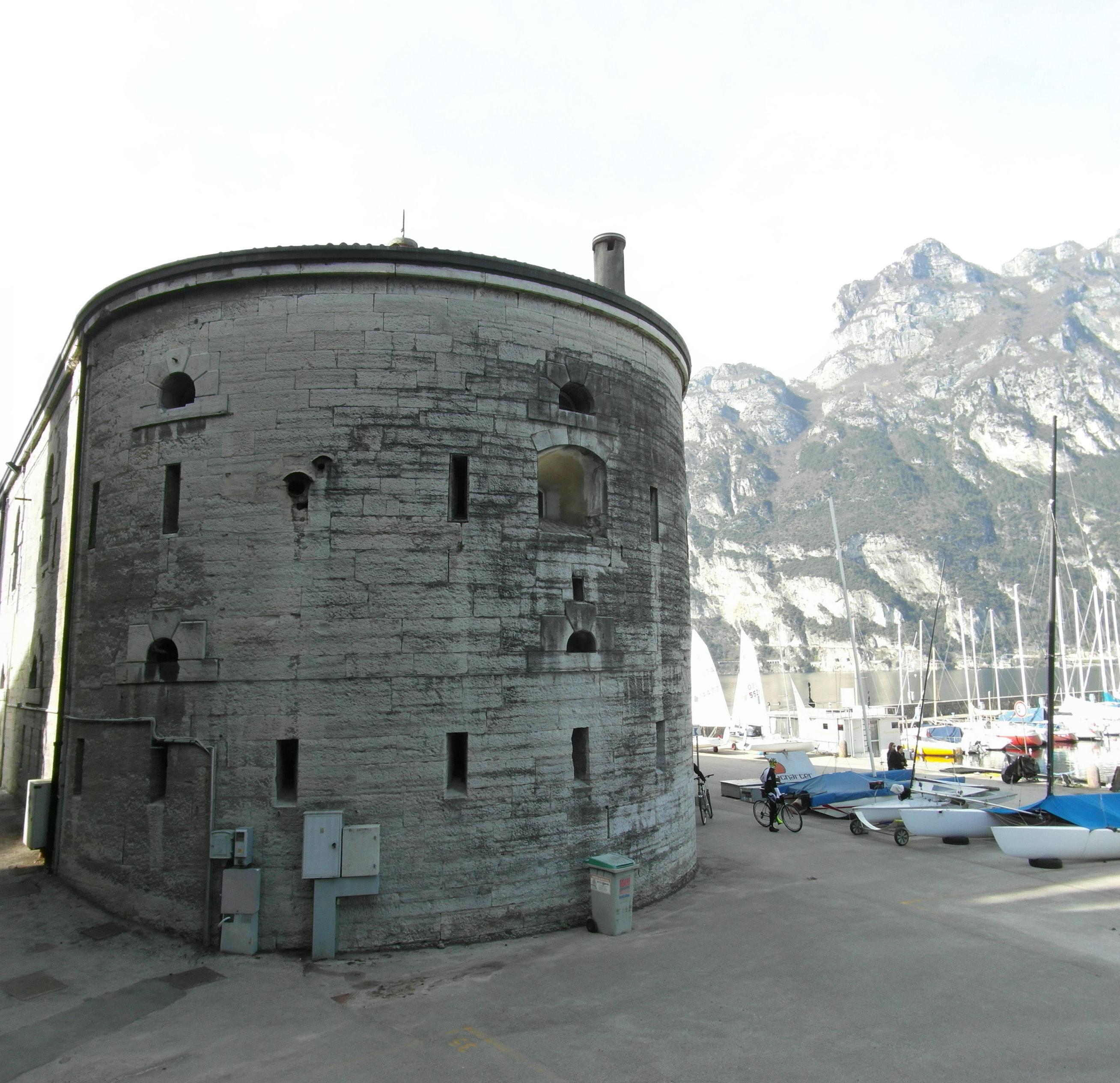 Forte San Nicolò